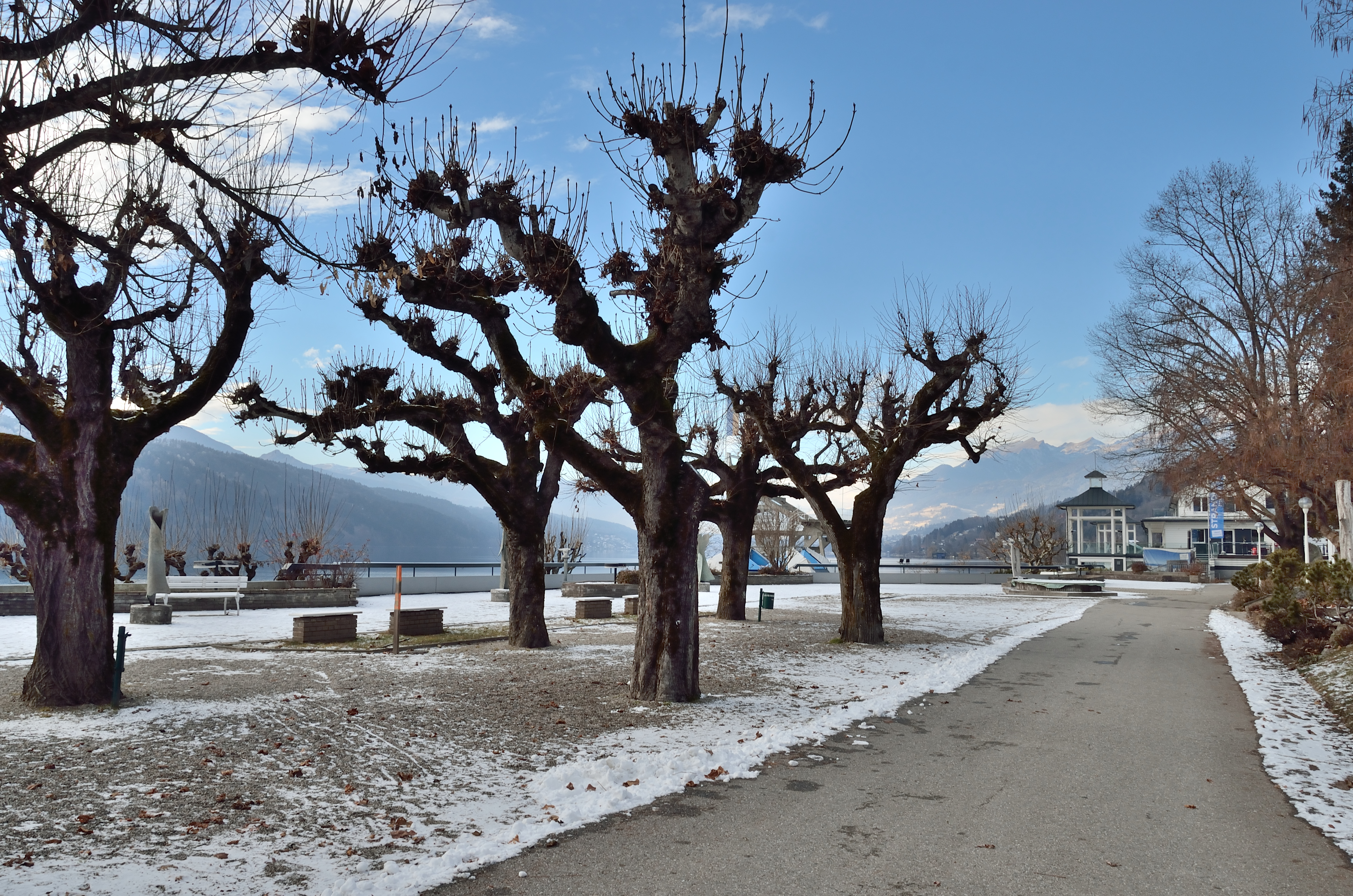 Die Przyborski-Promenade in Millstatt oberhalb des Strandbads ist nach dem ehemaligen Bürgermeister benannt.